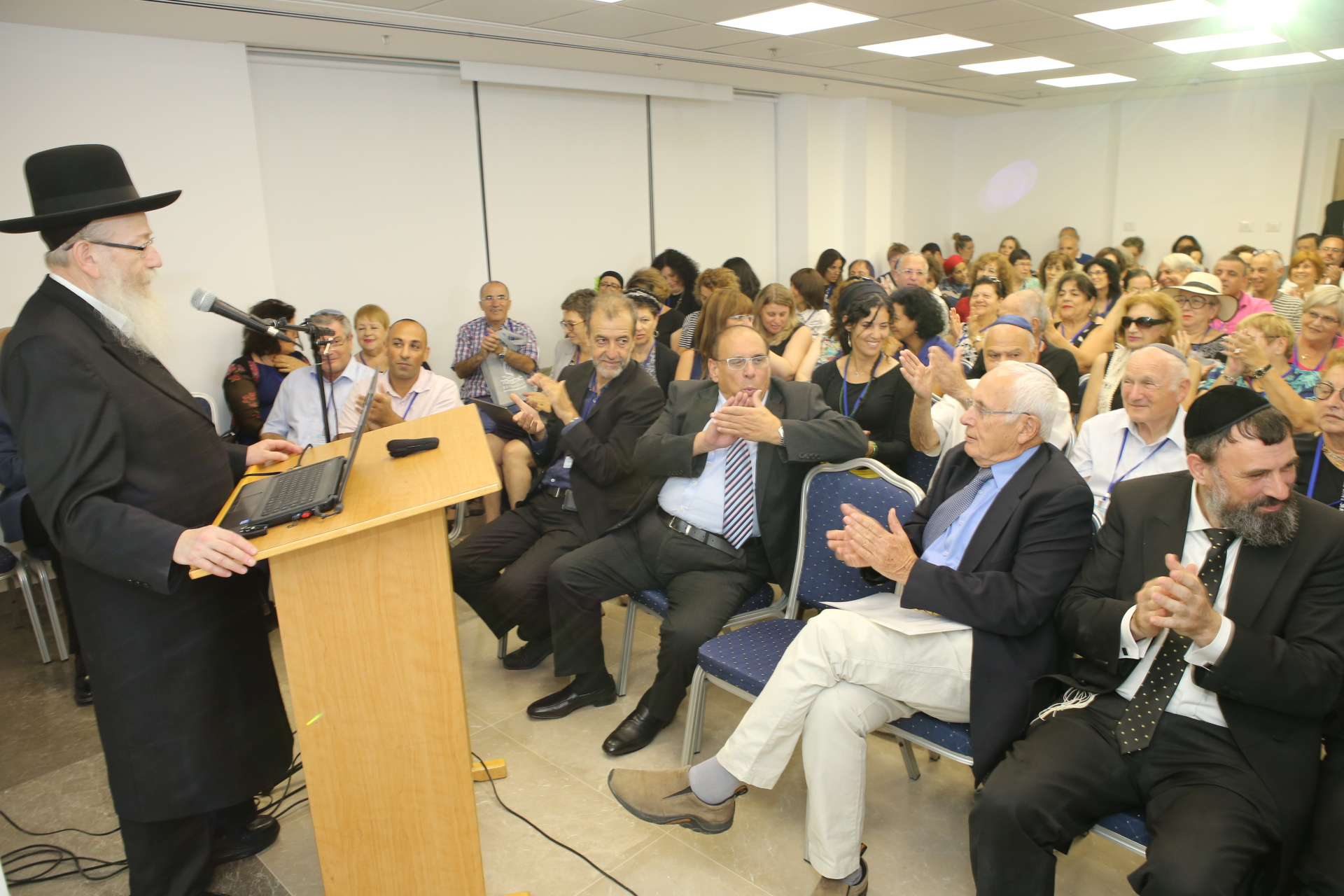 שר הבריאות יעקב ליצמן במרכז לאלצהיימר